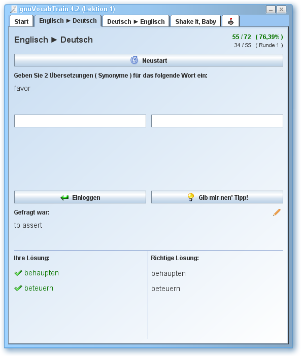 Der kostenlose Vokabeltrainer gnuVocabTrain in der Version 4.2